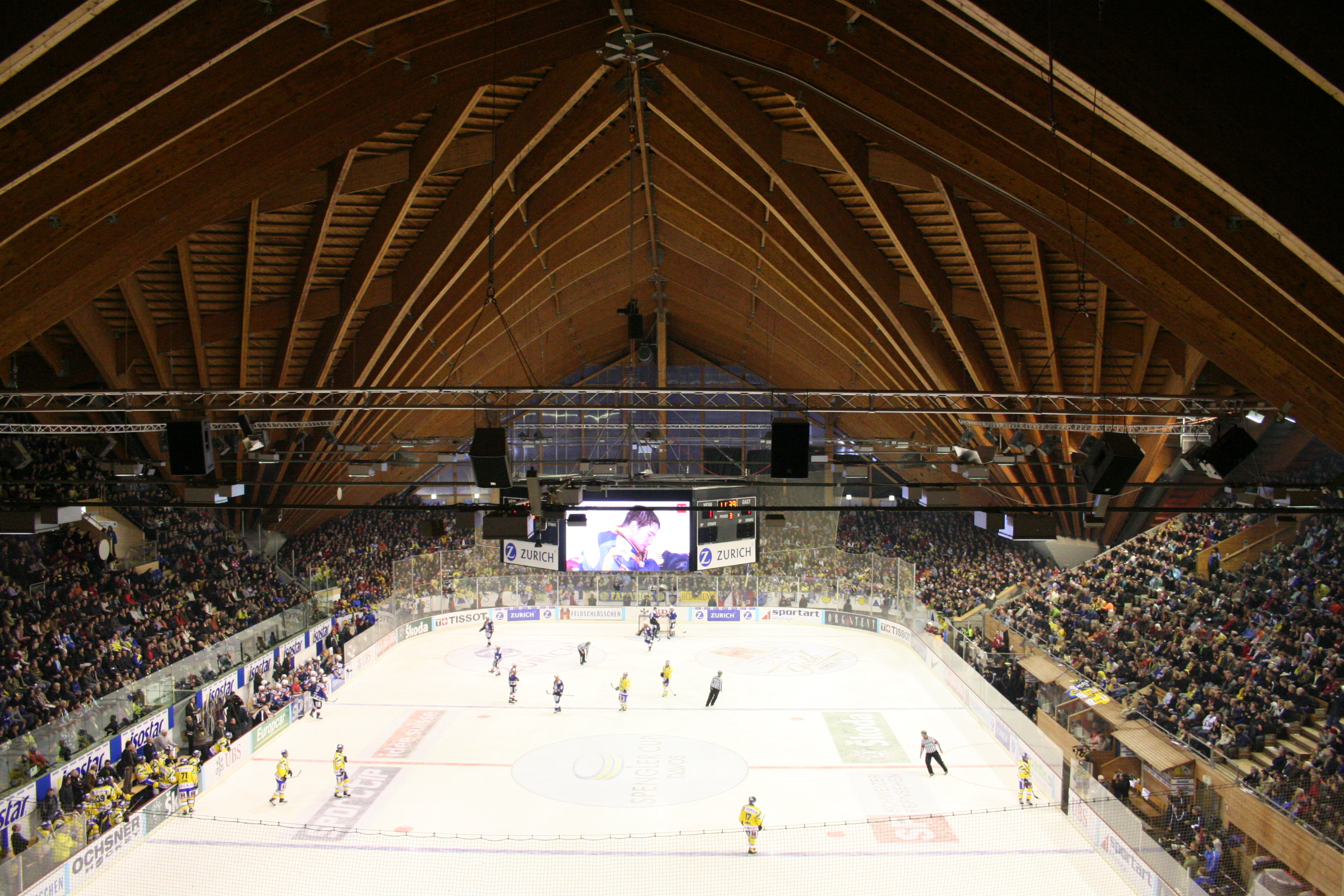 Vaillant Arena Davos von der Westtribüne während dem Spengler Cup 2006